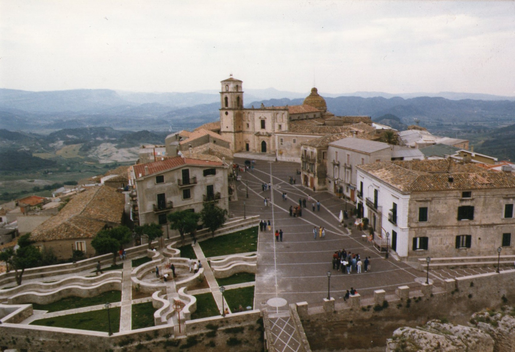 Piazza della chiesa di Santa Severina